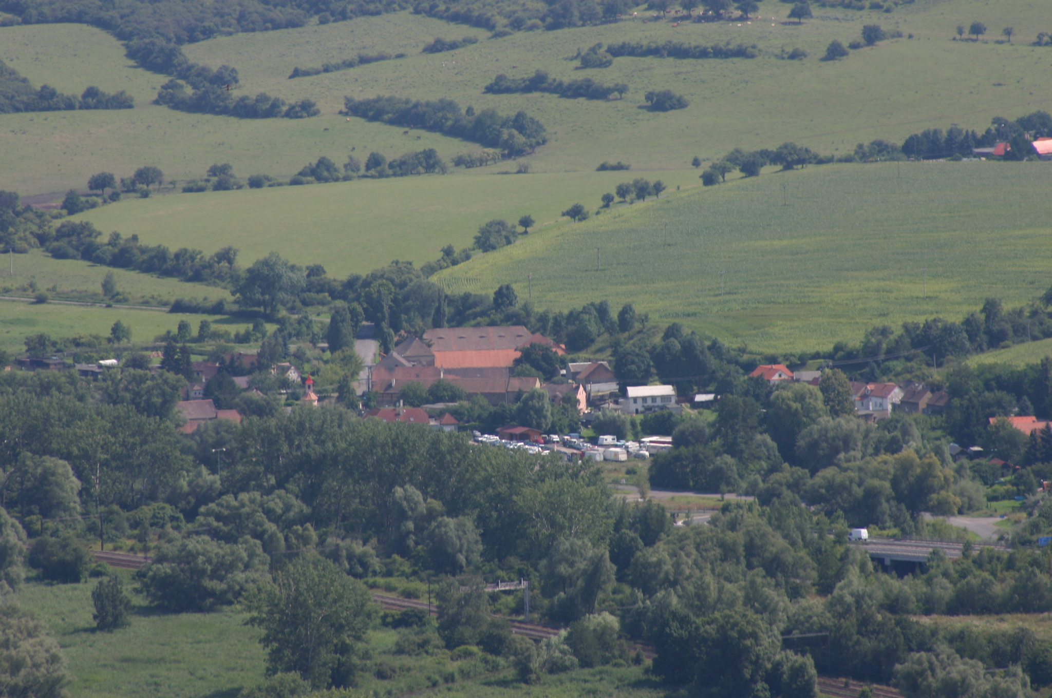 Pohled na osadu Liběšice v okrese Most